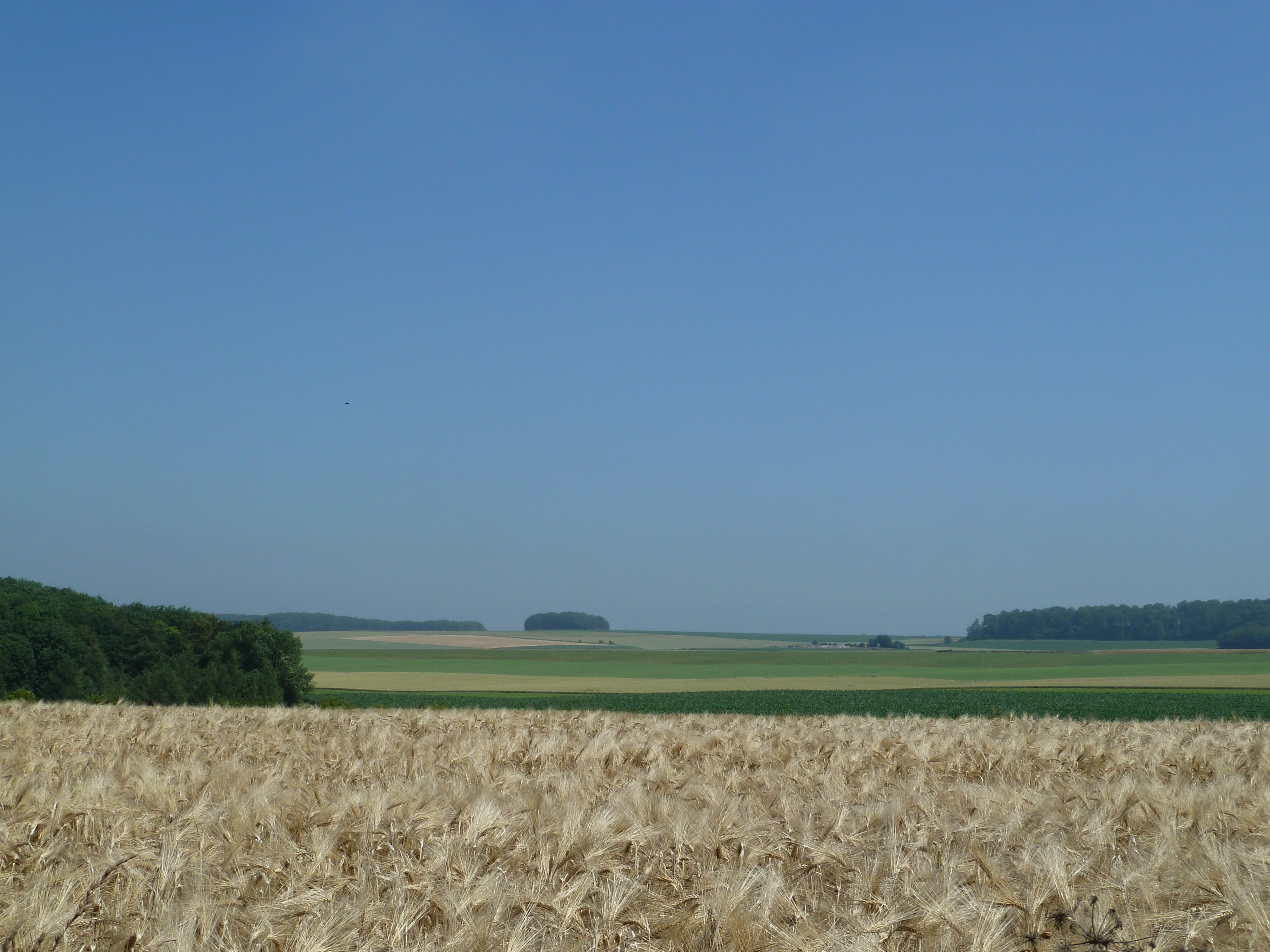 Panorama Pyramide van Verlée, Havelange, Belgique